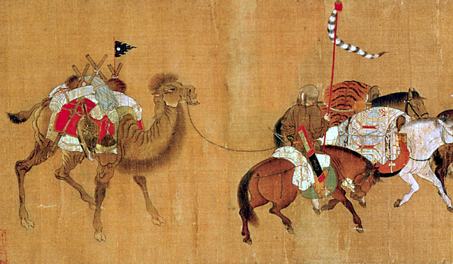 Монгольський воїн з вантажем: китайський малюнок (династія Юань)